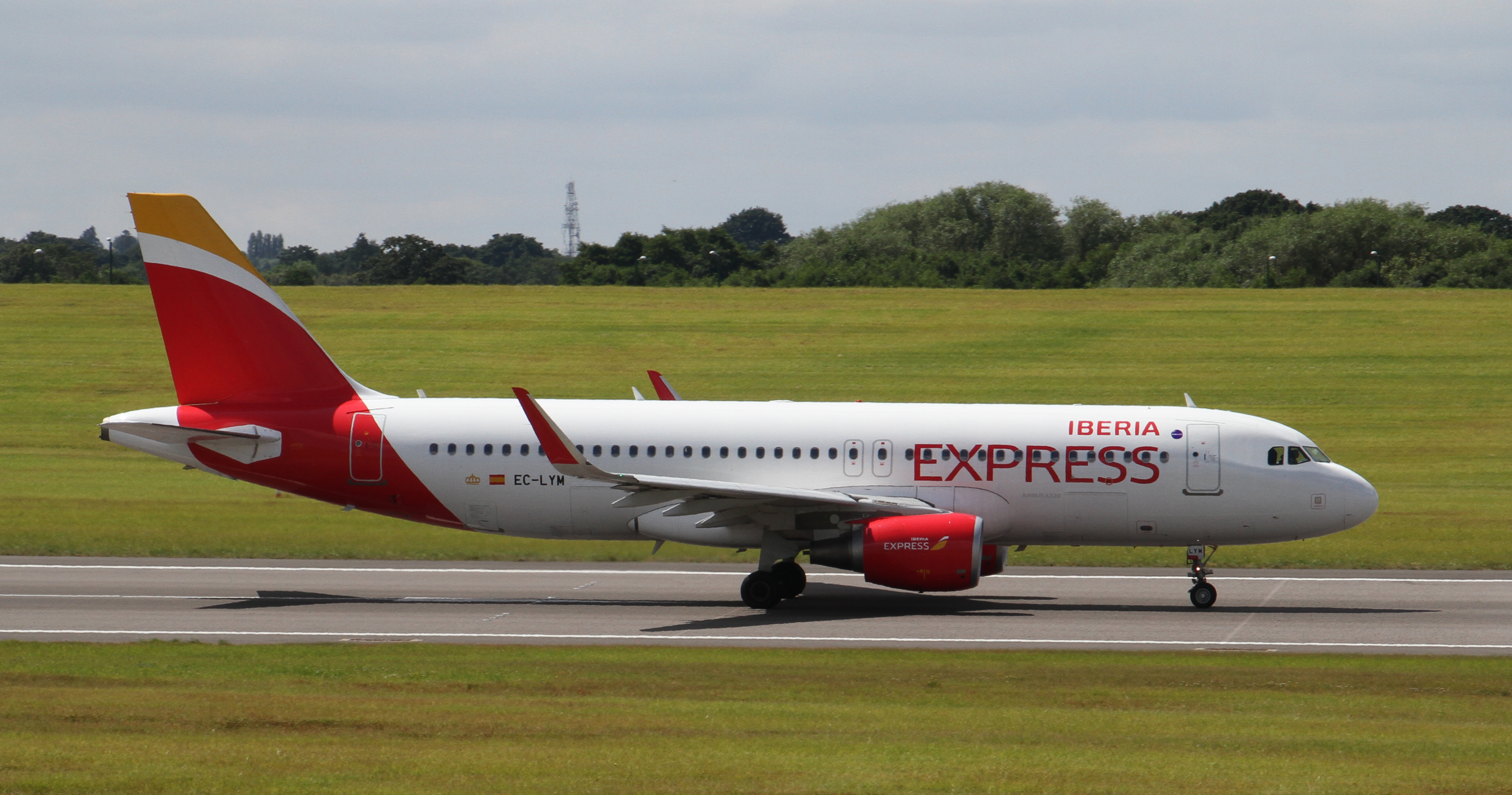 EC-LYM Iberia Express Airbus A320-216 2